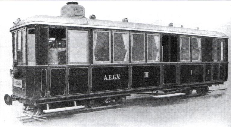 Az AEGV első, De Dion-Bouton rendszerű gőzmotorkocsija, 1900-as évek eleje